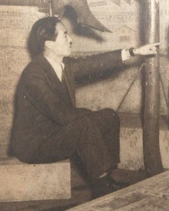 佐々木孝丸